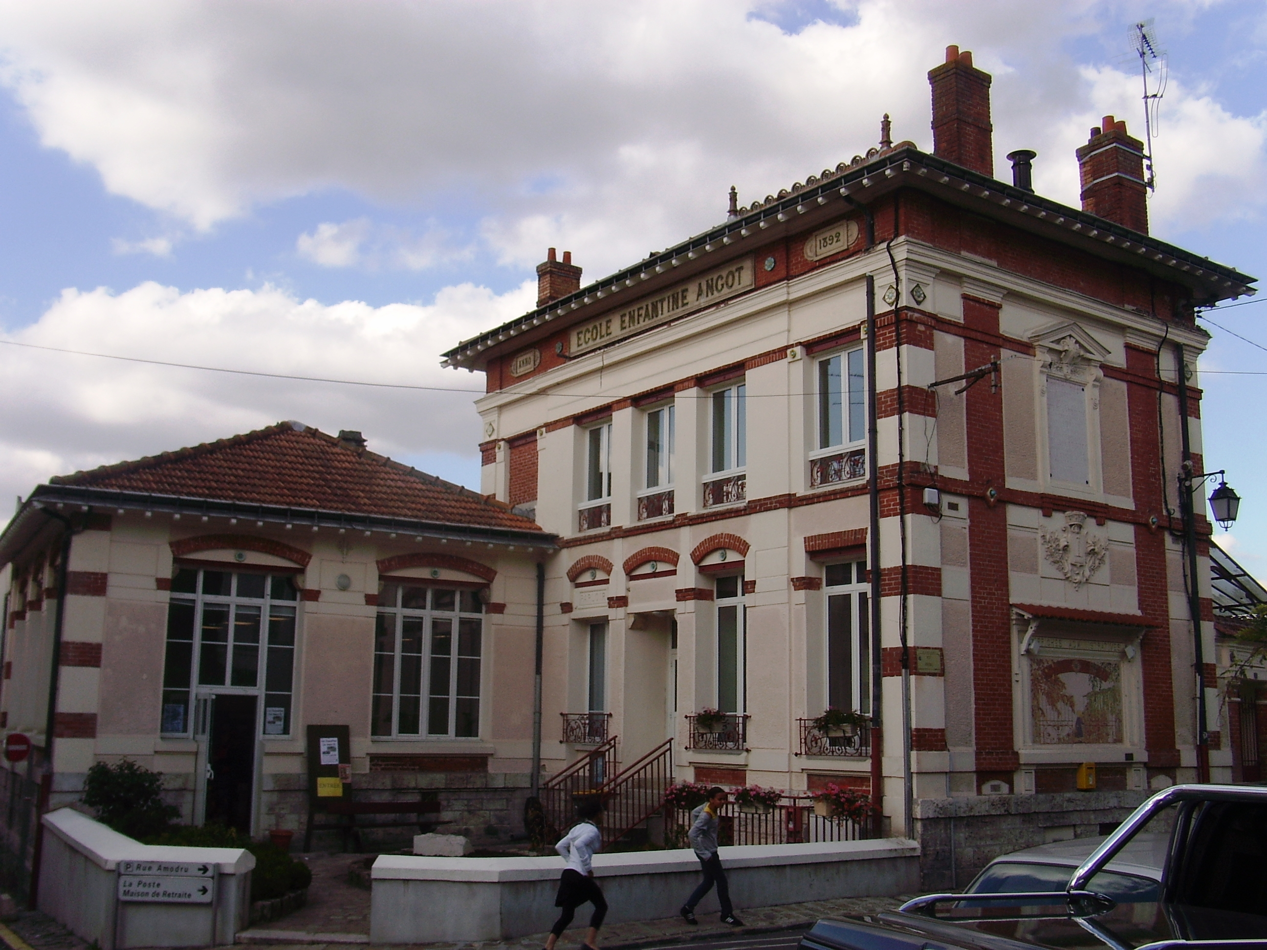 Salle de spectacle Sophie-Marie Brunel à La Ferté-Alais (91)